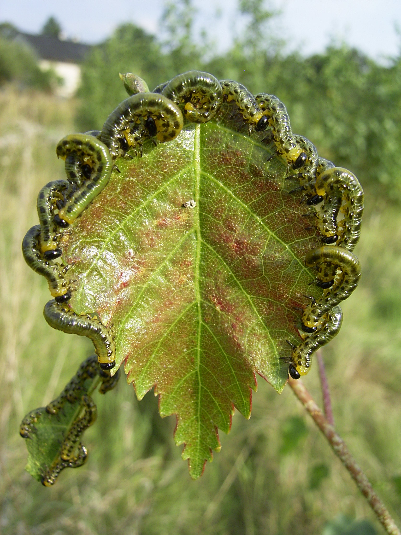 Larwy Płasta brzozowca (Craesus septentrionalis) żerujące na liściu brzozy (Betula pendula). Poland